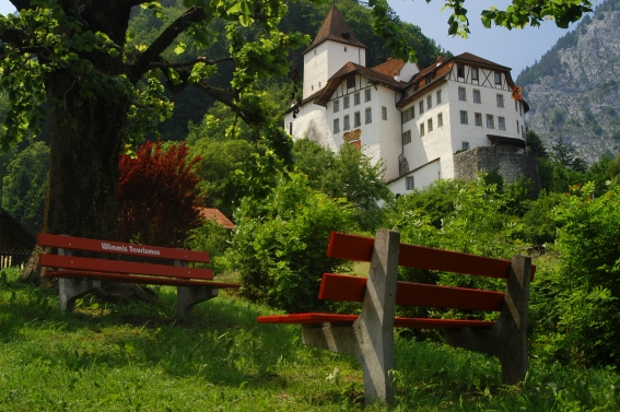 Schloss Wimmis im Frühling